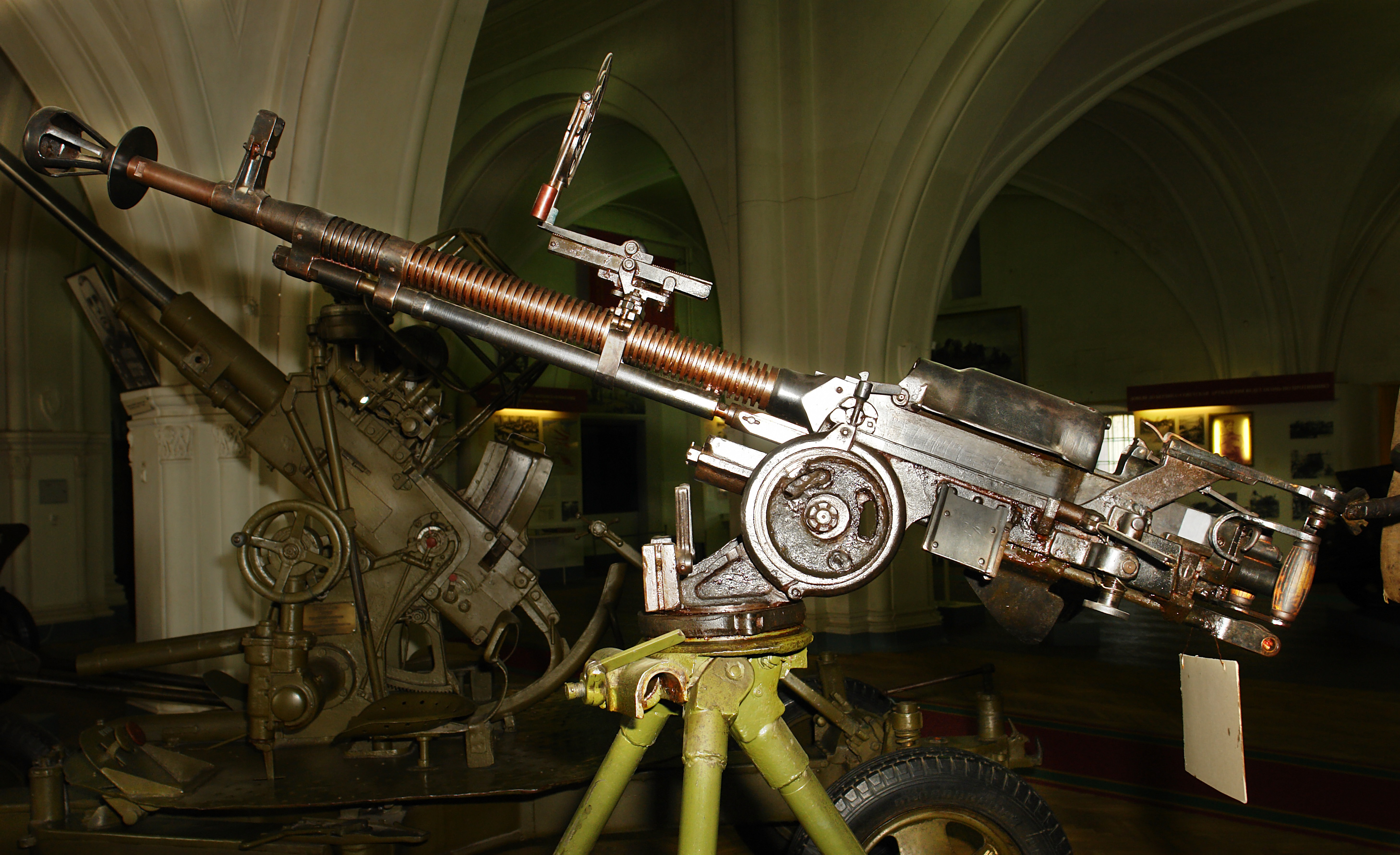 12,7-мм СТАНКОВЫЙ ПУЛЕМЕТ ДШК обр. 1938 г. НЯ№951 ГЕРОЯ СОВЕТСКОГО СОЮЗА МЛАДШЕГО СЕРЖАНТА И. Н. БРУСОВА. 25 января 1945 г., обороняя переправу через р. Одер, командир зенитно-пулеметного расчета младший сержант И. Н. Брусов при налете двенадцати немецко-фашистских самолетов сбил один из них. Но остальные при повторных заходах подвергли храбрых зенитчиков жесточайшему обстрелу, пытаясь их уничтожить. Убит был первый номер расчета, тяжело ранен Брусов. Верный воинскому долгу, отважный воин из последних сил продолжал вести бой и сбил еще один самолет. Сраженный неприятельской пулей, он упал на пулемет, так и не выпустив его из рук. За мужество и героизм Указом Президиума Верховного Совета СССР И. Н. Брусову посмертно было присвоено звание Героя Советского Союза. Приказом Министра обороны СССР он навечно зачислен в списки гвардейского зенитного артиллерийского соединения. Военно-исторический музей артиллерии, инженерных войск и войск связи, Санкт-Петербруг.